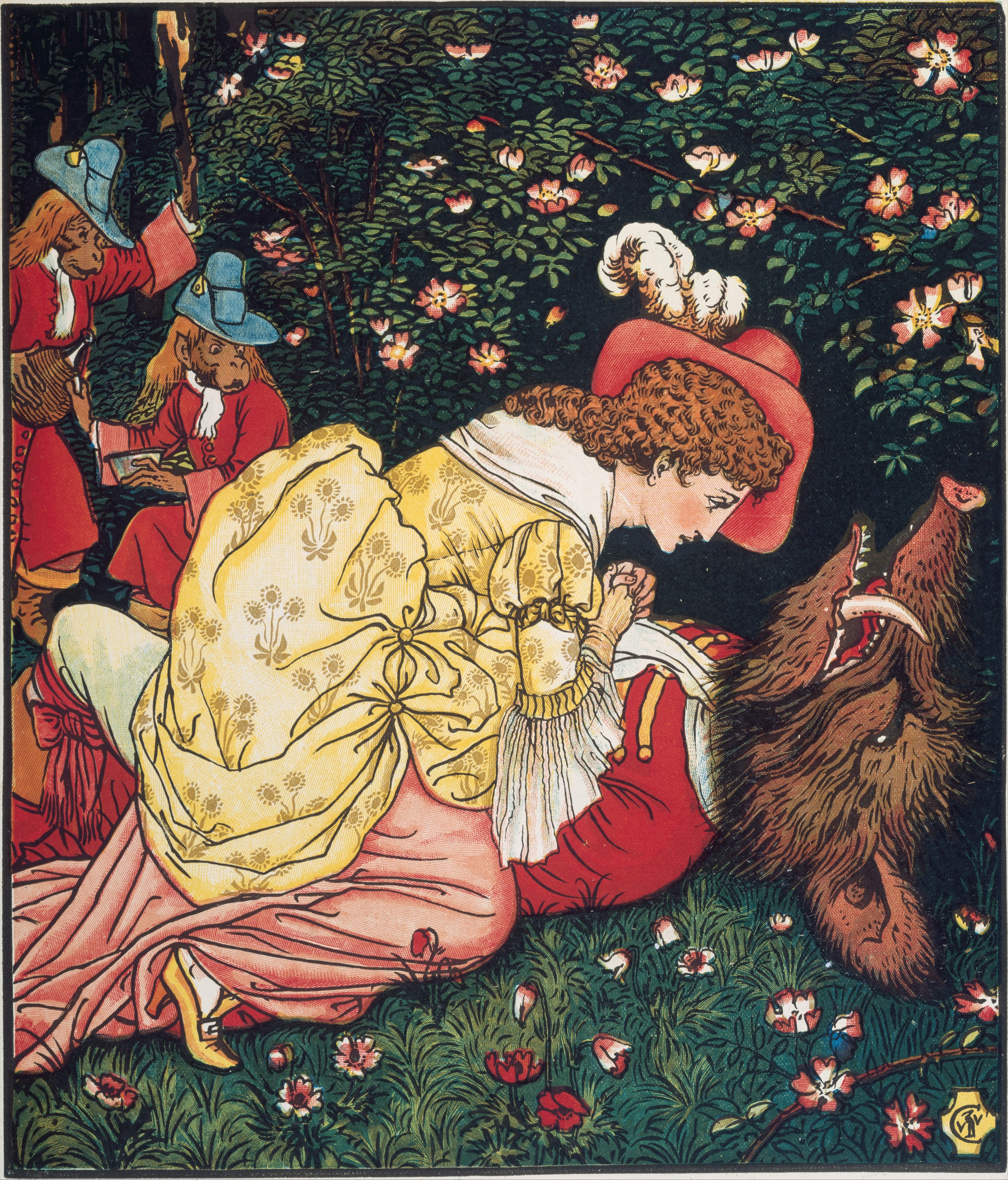 Book; Books